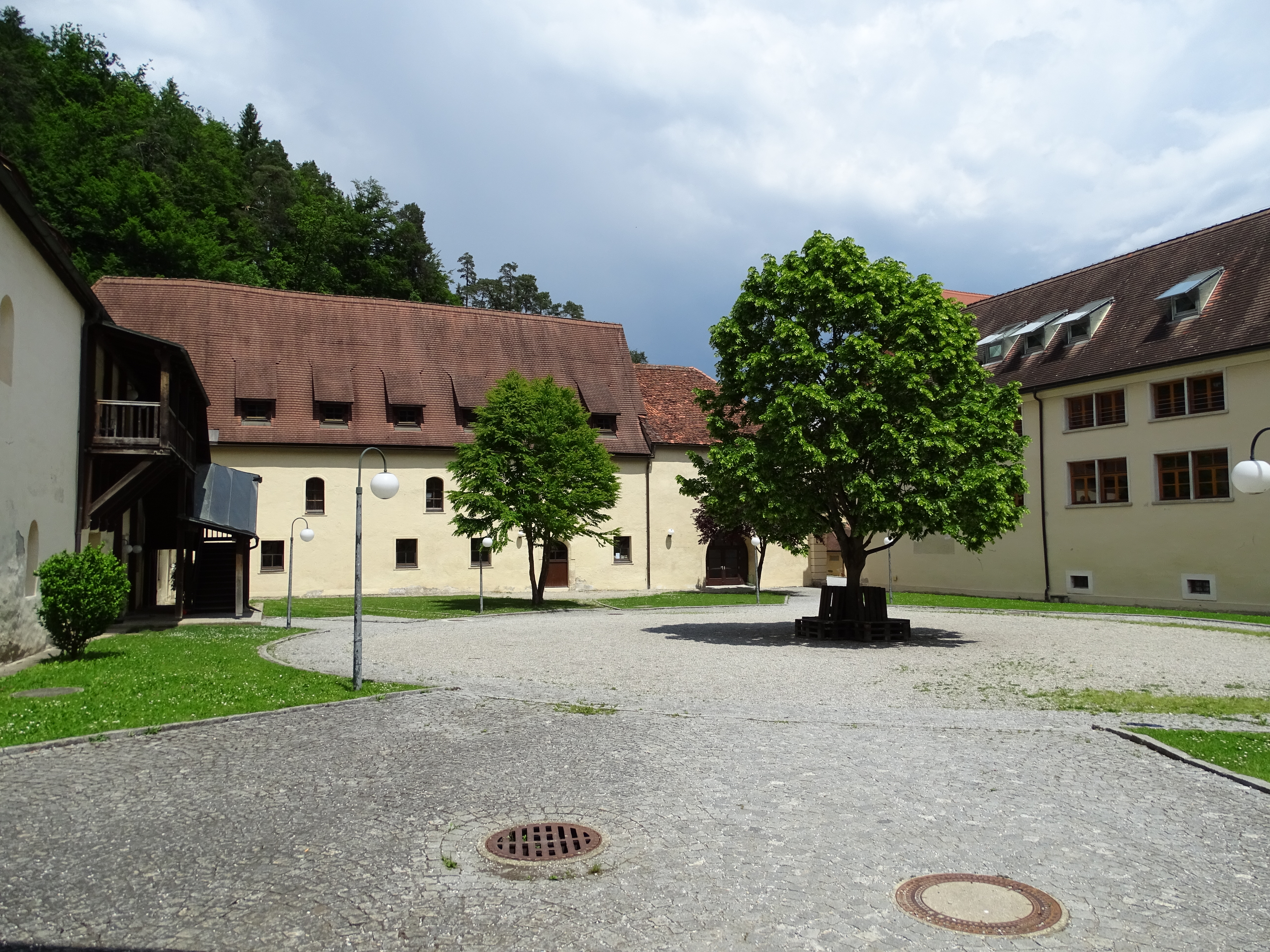 Der Obere Hof des Stiftes Rein